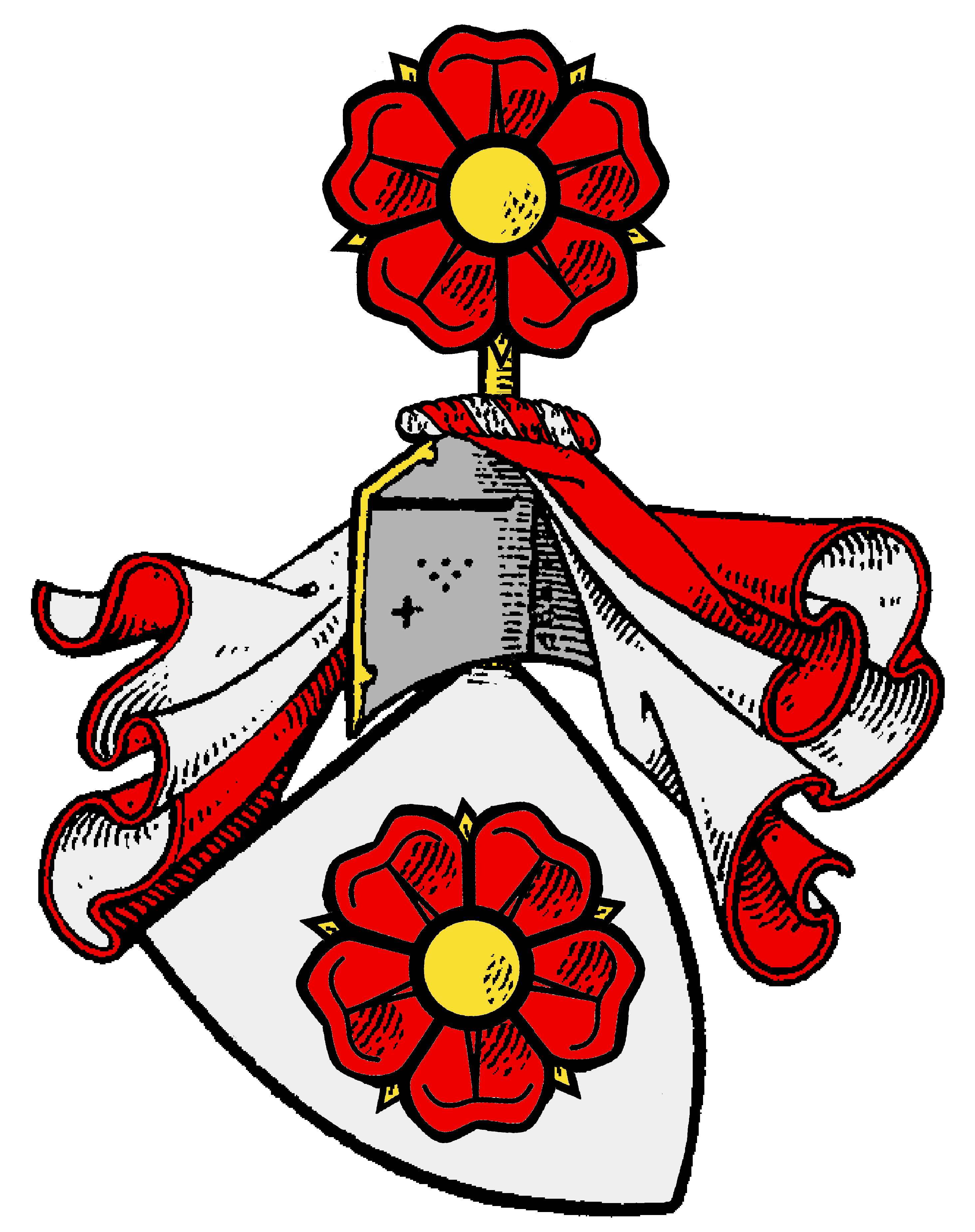 Stammwappen der Edelherren zur Lippe (Haus Lippe und -seine Branche- Haus Schaumburg-Lippe)